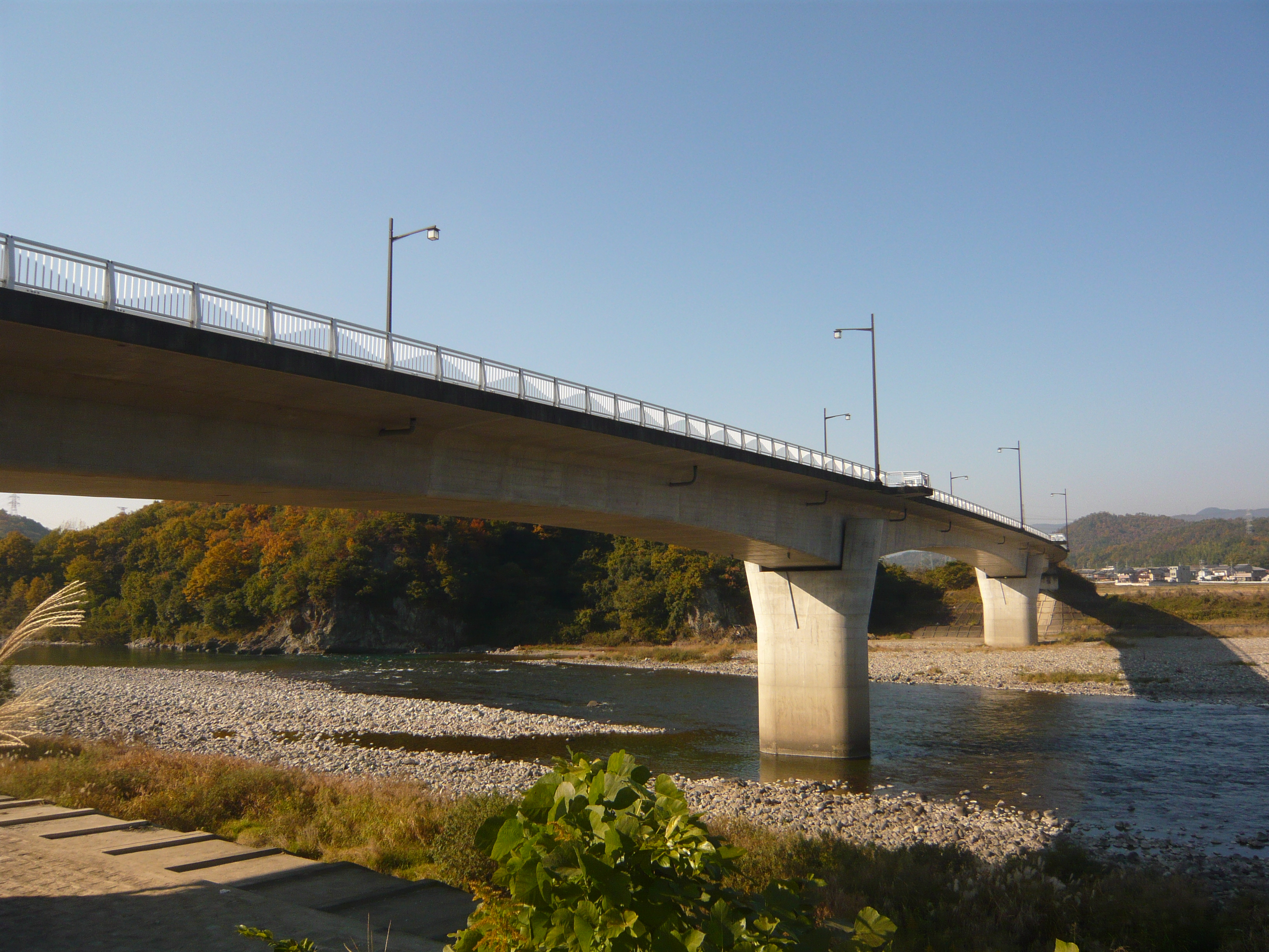 Ayunose Ohashi Bridge 鮎ノ瀬大橋（鮎ノ瀬大橋）,Seki,Gifu,Japan（岐阜県関市）で撮影。